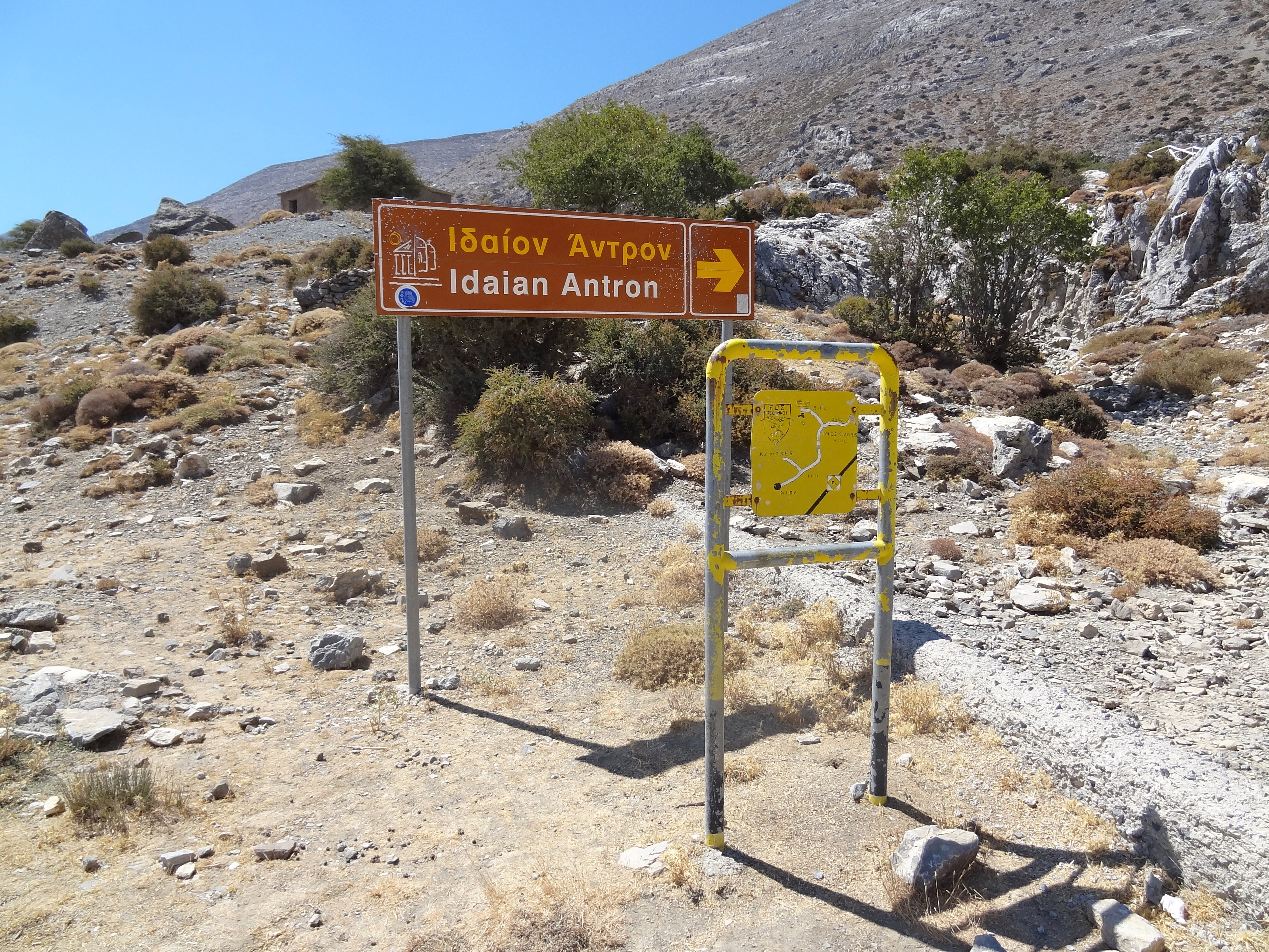 Hinweisschild zur Idäischen Grotte an der Nida-Hochebene, Gemeinde Anogia, Regionalbezirk Rethymno, Kreta, Griechenland